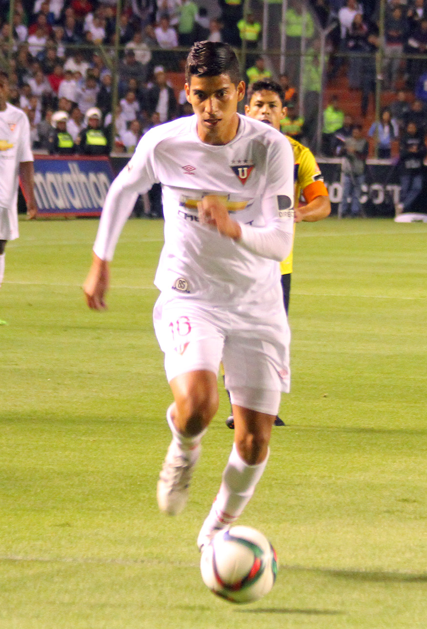 Quito, 29 abr (Andes).- Encuentro de Liga vs Barcelona en Casa blanca. Gol de J. Cevallos. Fotografías: Carlos Rodríguez/Andes.